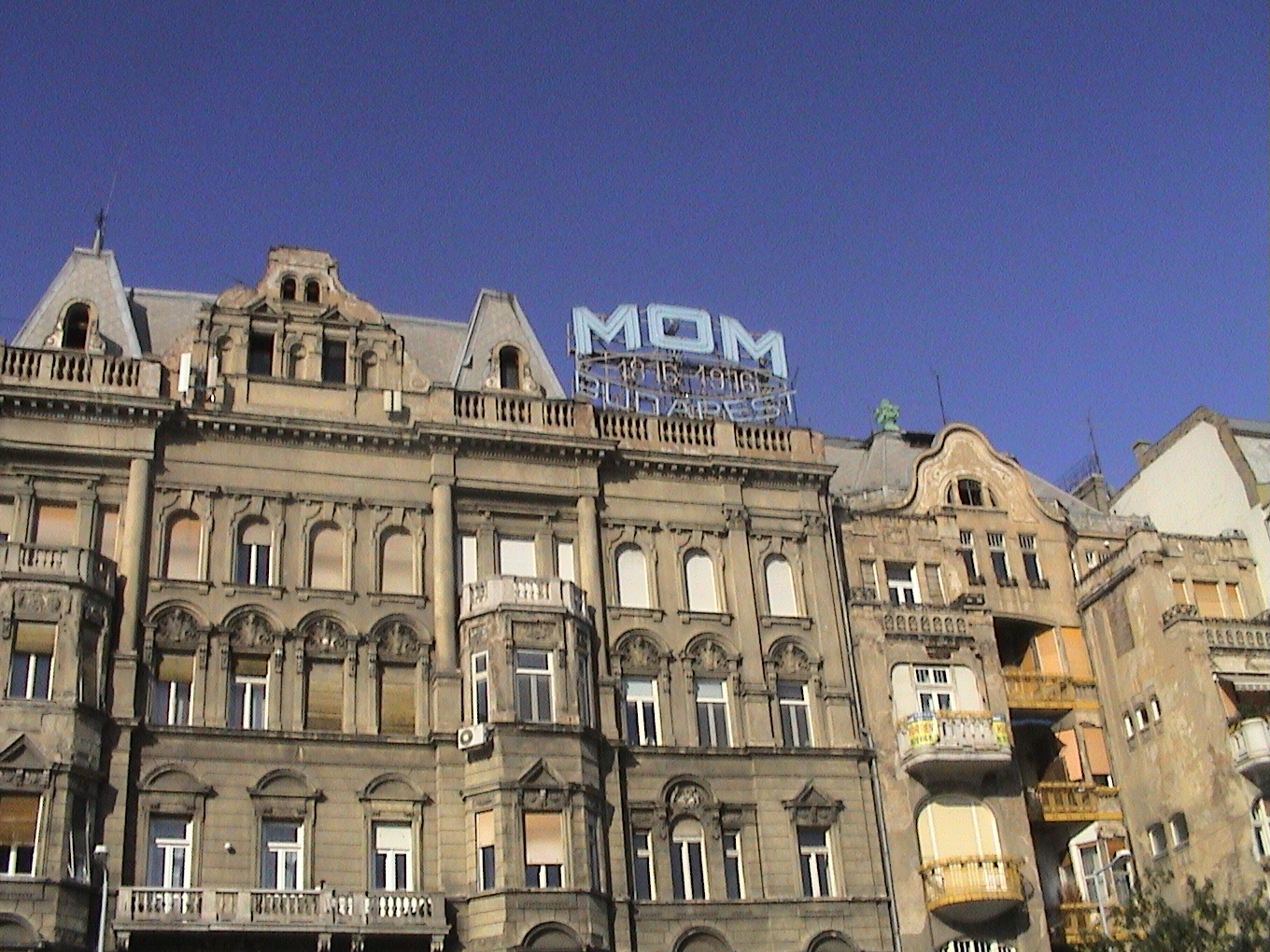 A Magyar Optikai Művek reklámja. Készült a cég centenáriumi évében, 1976-ban. A cég 1998-ban szűnt meg!